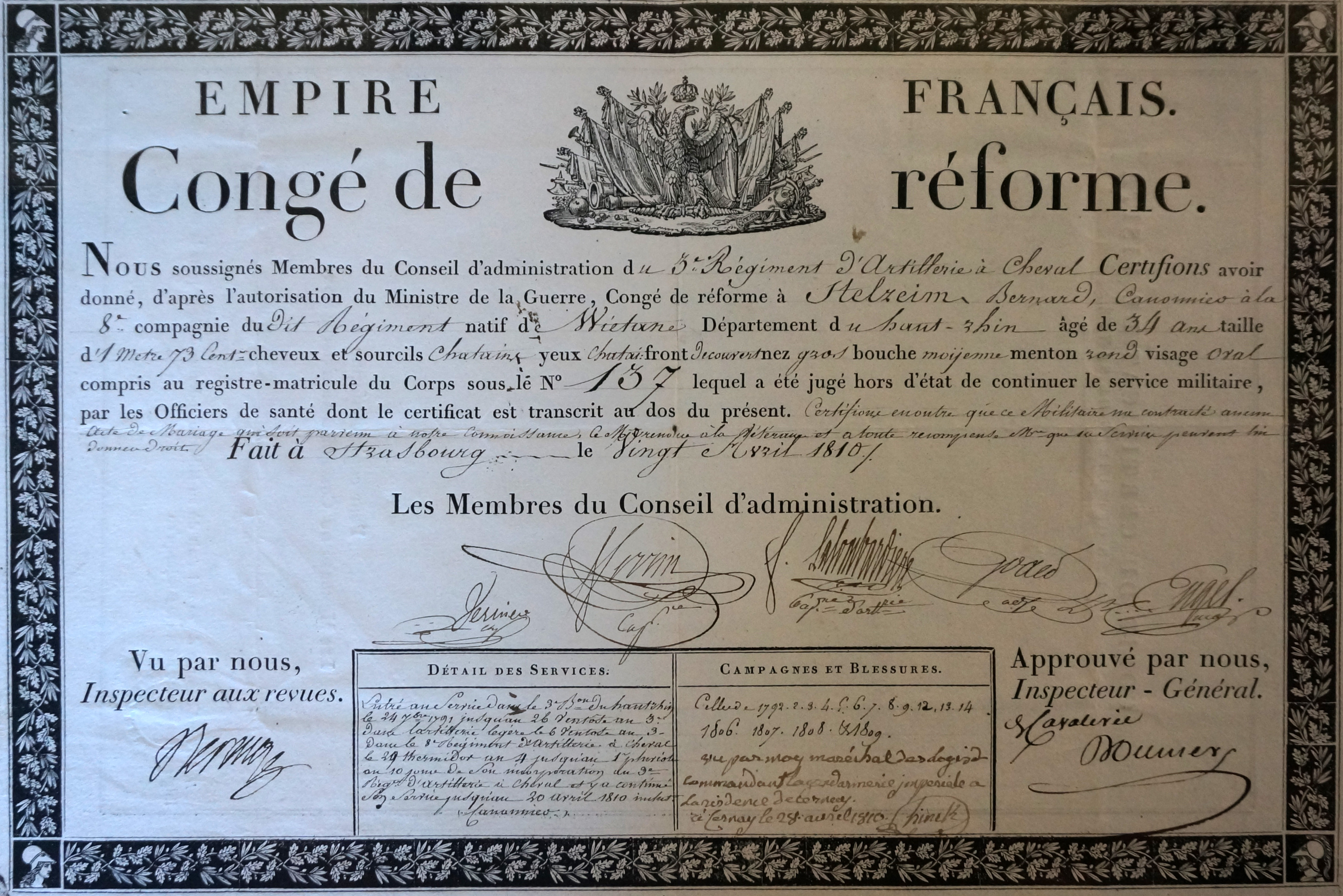 congé de réforme de Bernard Helzeim, canonier au 3 régiment d'artillerie daté de 1810.